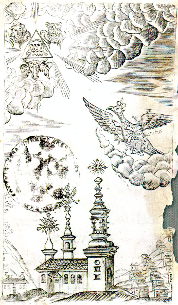 Беларуская (тарашкевіца): Клецак (Klecak), Фарны касьцёл (Fara). Гравюра з выданьня: Głos seraficzny, trojákim w trzech Osobách Boga wychwalájący, przy nowey Bráctwá Troycy Przenayśw. pod tymze tytułe [sic] w kośćiele fárnym Kleckim elekcyi, y introdykcyi intonowány, z pod prásy drukárskiey wynieśiony. Roku ktorego Bog mowił nam w Synu swoim. 1724. Vilnae Typis Acad. Societatis Jesu.